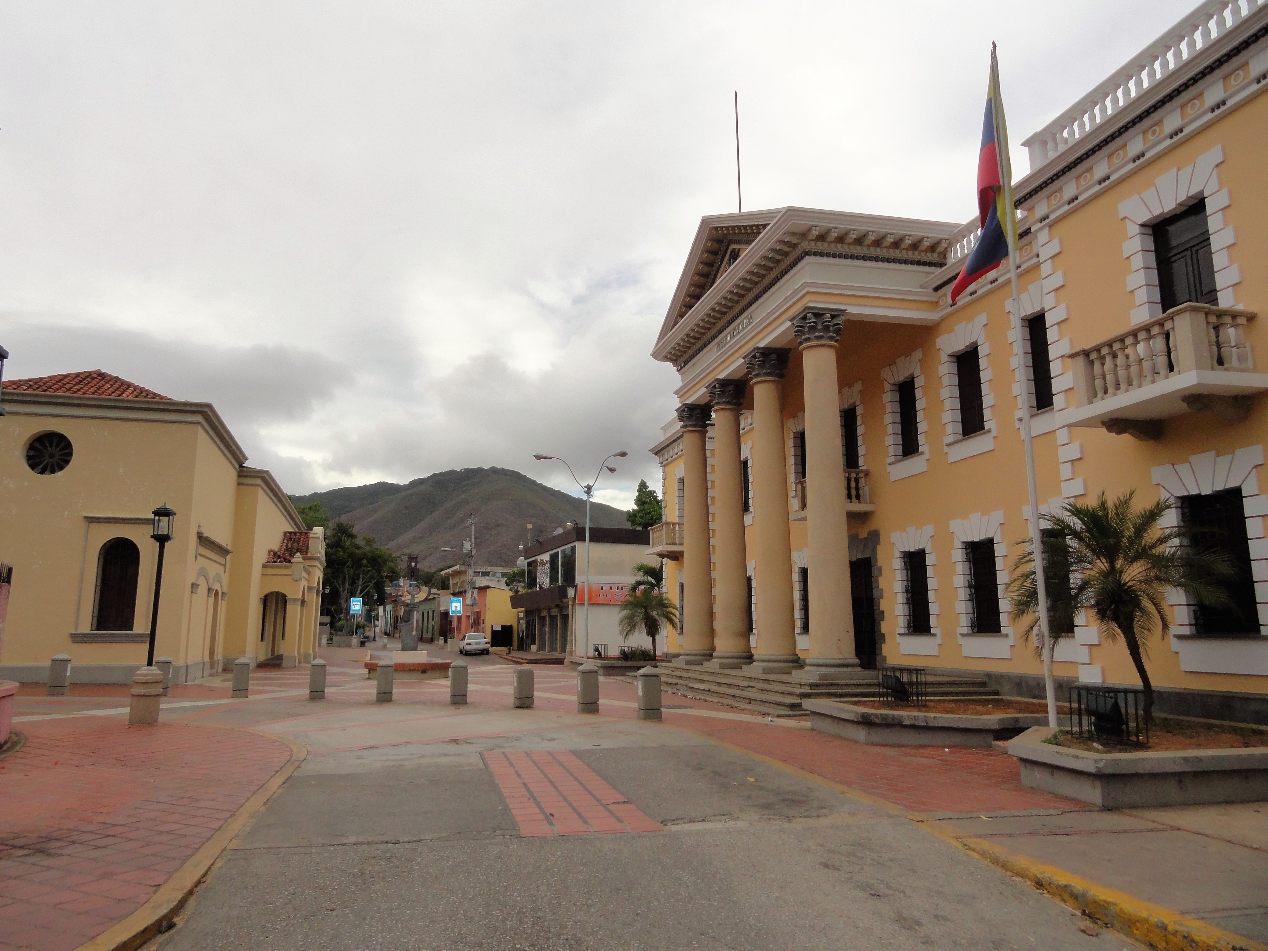 Antiguo convento de San Francisco